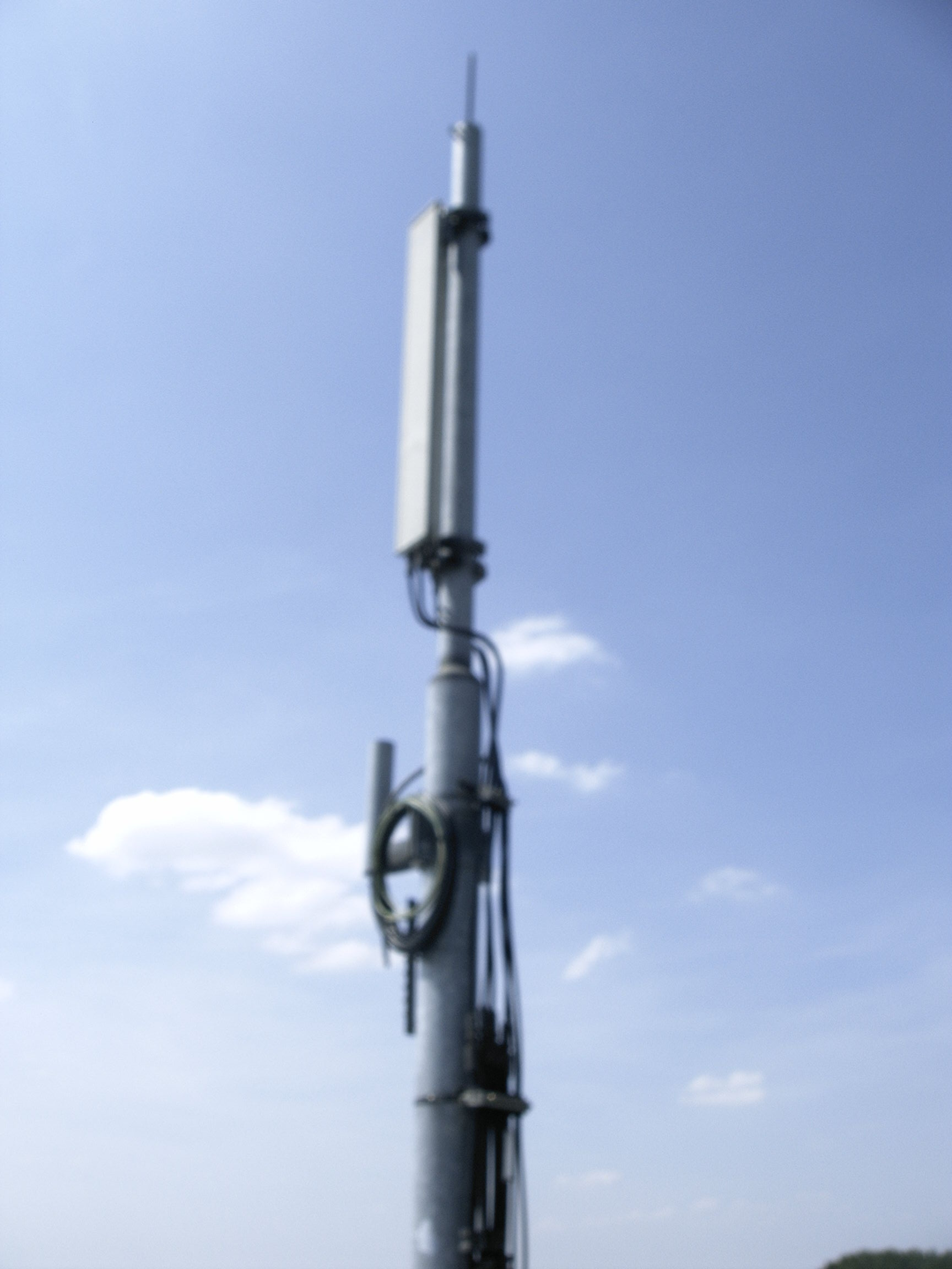 Mobiele telefoon mast van T-mobile op ongeveer 60 meter hoogte